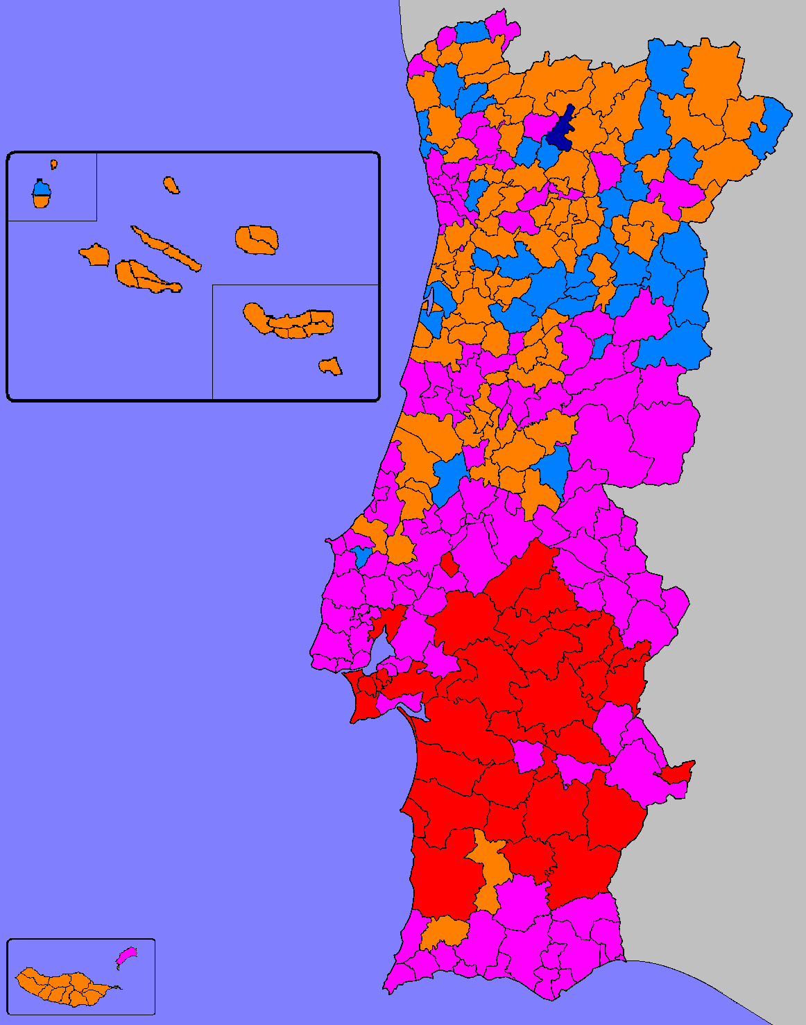 Mapa ilustrativo do partido mais votado por Concelho